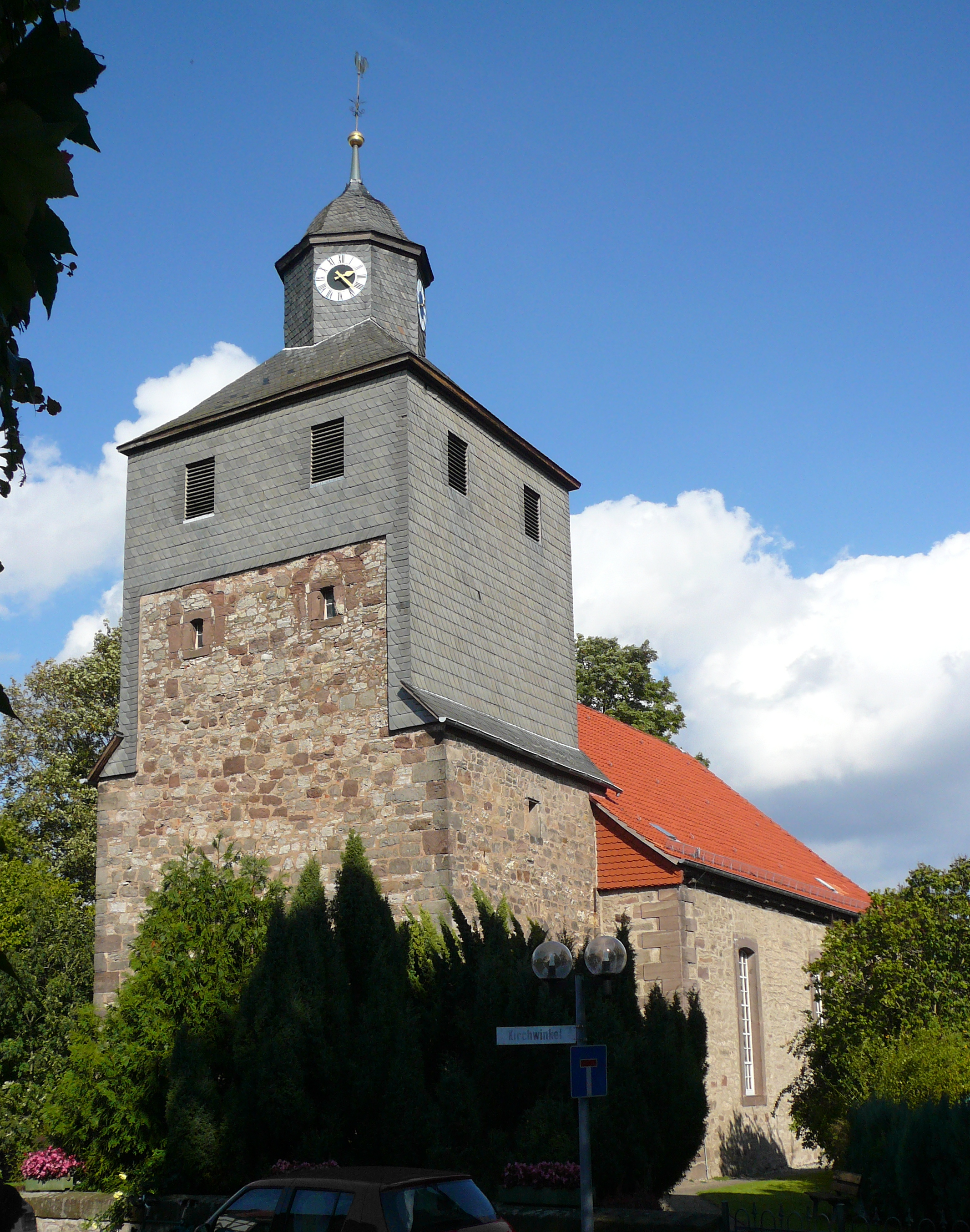 Ev.-luth. Kirche St. Johannis in Harste, Flecken Bovenden, Niedersachsen. Erbaut 1766/69 unter Einbeziehung des gotischen Vorgängerbaus